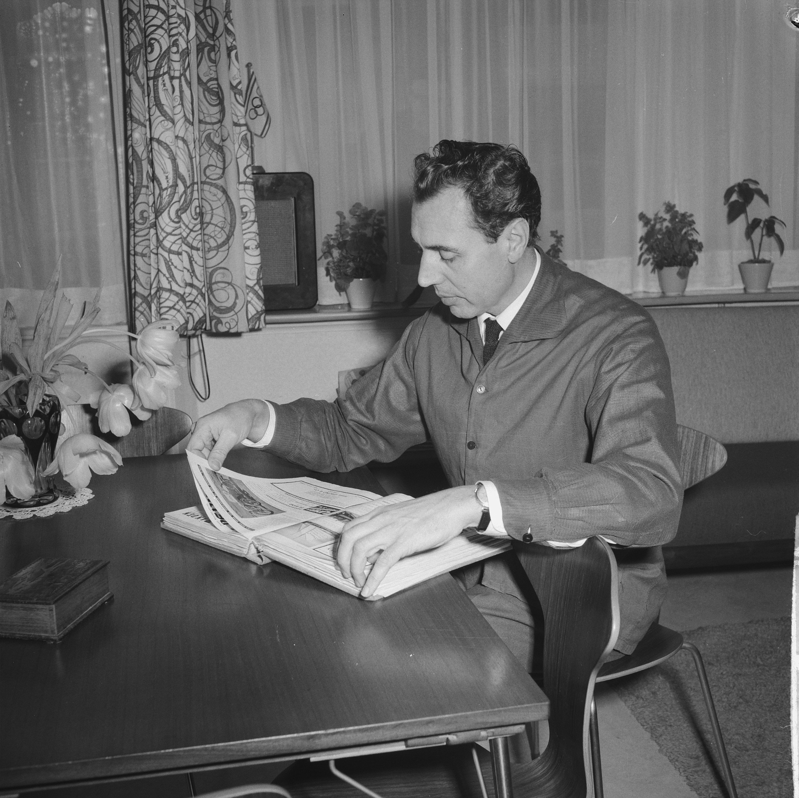 Collectie / Archief : Fotocollectie Anefo Reportage / Serie : [ onbekend ] Beschrijving : Oud-atleet Frits de Ruyter (de Ruijter) sportcommentator van atletiekwedstrijden Annotatie : Opdracht Geillustreerde Pers Datum : 10 januari 1961 Trefwoorden : programmamakers Persoonsnaam : Ruyter, Frits de Fotograaf : Lindeboom, Henk / Anefo Auteursrechthebbende : Nationaal Archief Materiaalsoort : Negatief (zwart/wit) Nummer archiefinventaris : bekijk toegang 2.24.01.03 Bestanddeelnummer : 911-9621